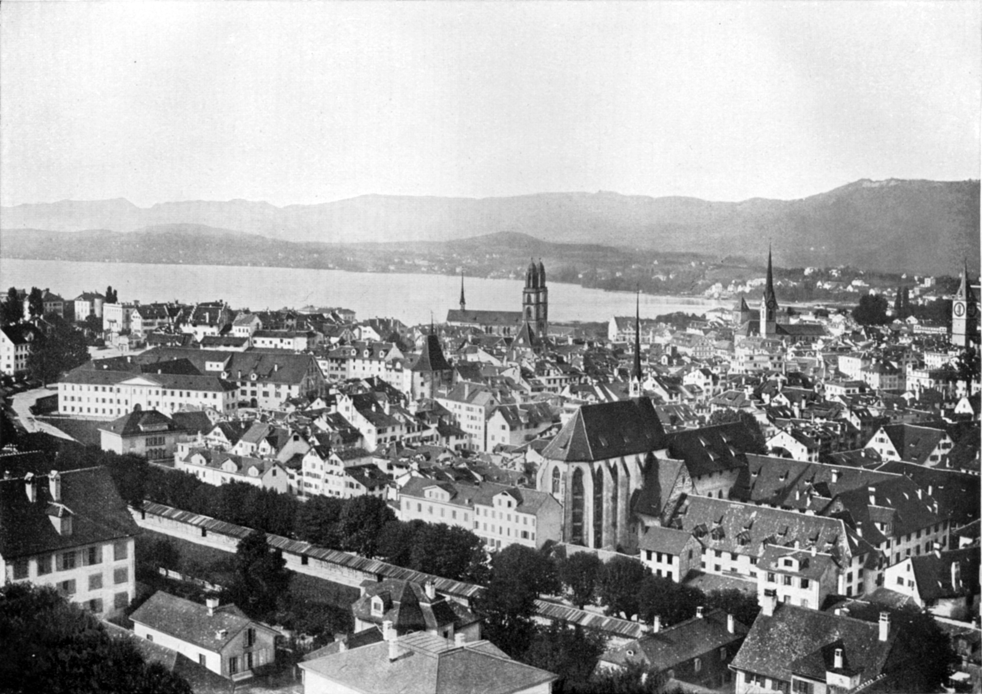 Blick auf das Predigerquartier in Zürich von der Polyterrasse aus, vor 1878 (Messbuden am Hirschengraben wurden in diesem Jahr abgetragen)